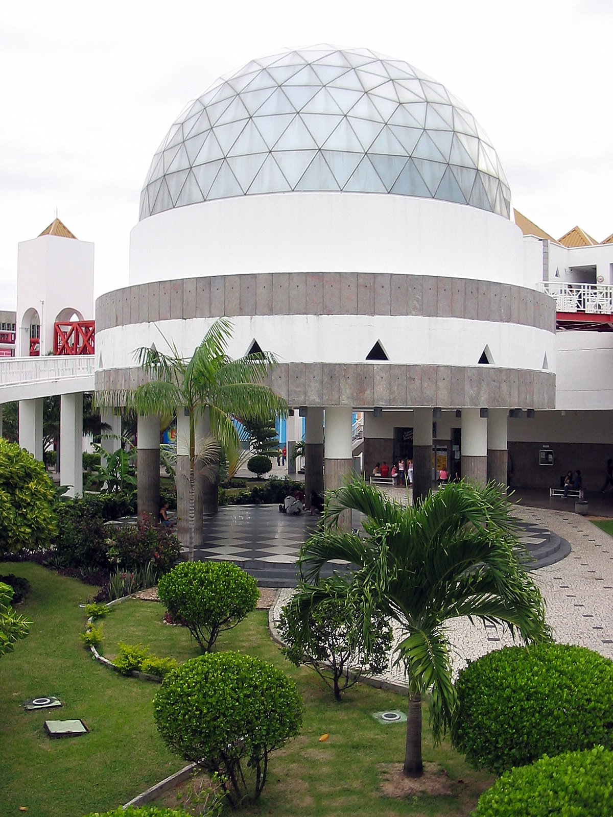 Planetário Rubens de Azevedo do Centro Dragão do Mar de Arte e Cultura de Fortaleza